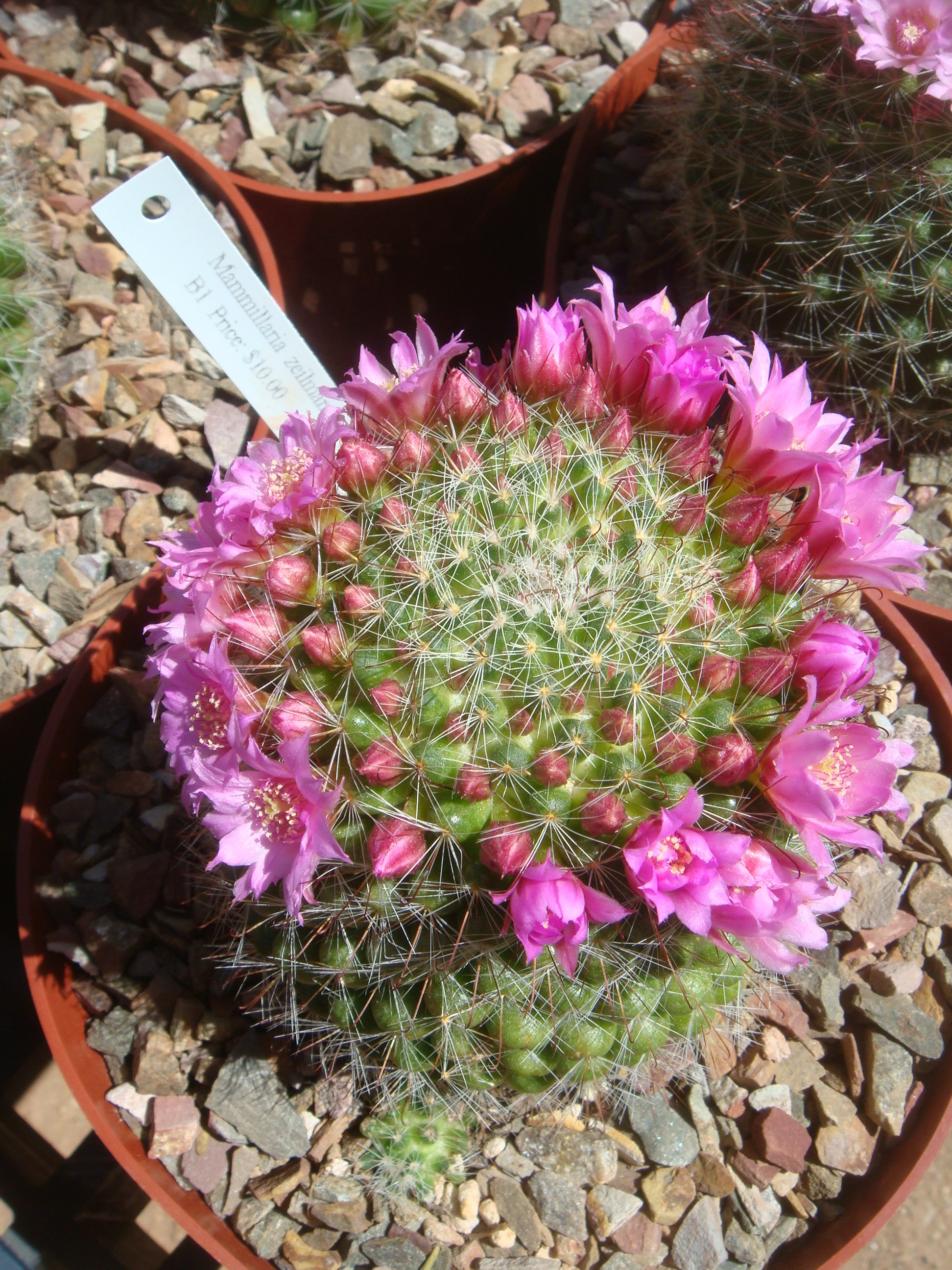 Mammillaria zeilmanniana, cultivated, Desert Botanical Garden, Phoenix, Arizona